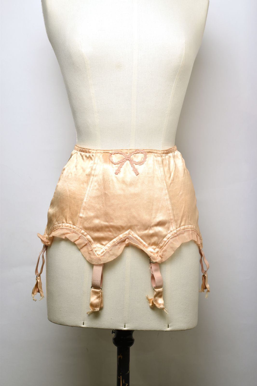 Lichtroze jarretelgordel waarop middenvoor ter decoratie met sierband een strik is vastgezet ter hoogte van de taille. Aan de voorkant voorzien van twee baleinen, die aan de binnenkant, voor het comfort, aan de onderkant extra zijn beschermd met een stukje zeemleer. De onderzoom, die aan de voorkant in twee punten uitloopt, is afgewerkt met een brede baan tule. Vier gespen om kousen mee vast te zetten. Sluit middenachter met gebreid rekbaar band en twee haken en ogen. Opschriften: Danièle.